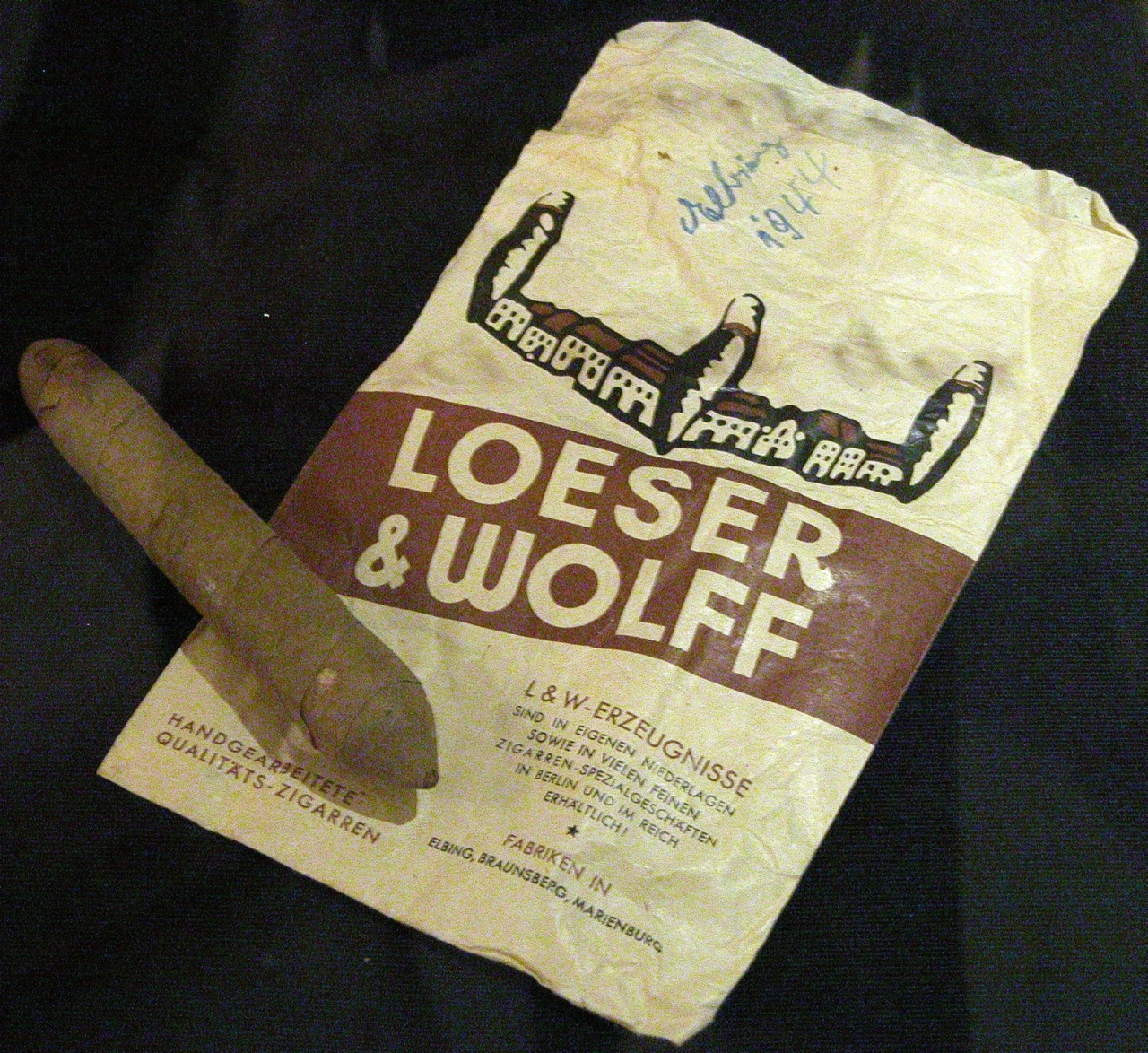 Papiertüte der Zigarren-Firma Loeser & Wolff mit Werbung und einer Zigarre. Handschriftlicher Vermerk: „Elbing 1944“.